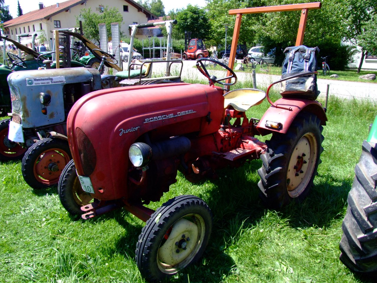 Porsche Junior mit 15 PS, Baujahr 1964